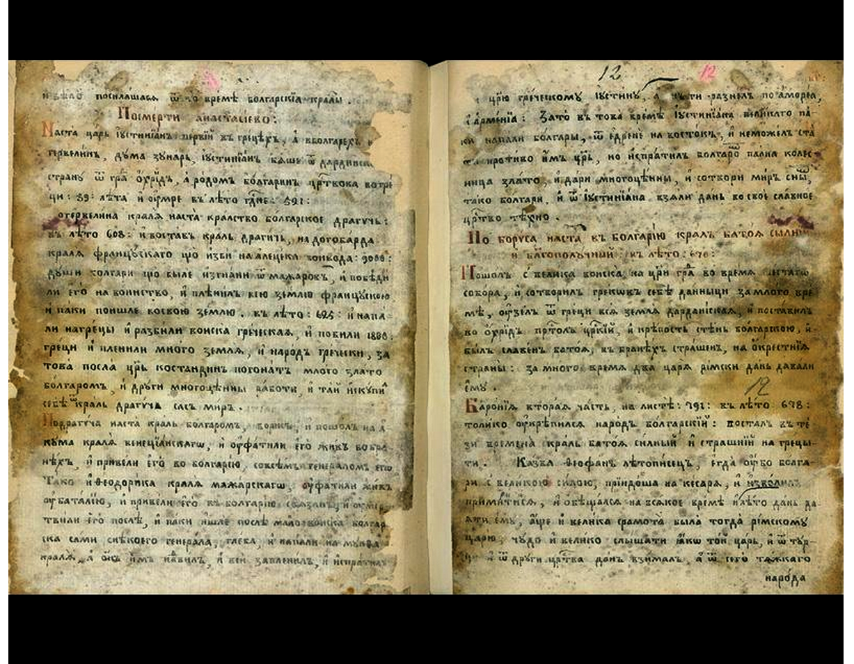 Старозагорският препис на Паисиевата "История Славнобългарска" (1837 г.)